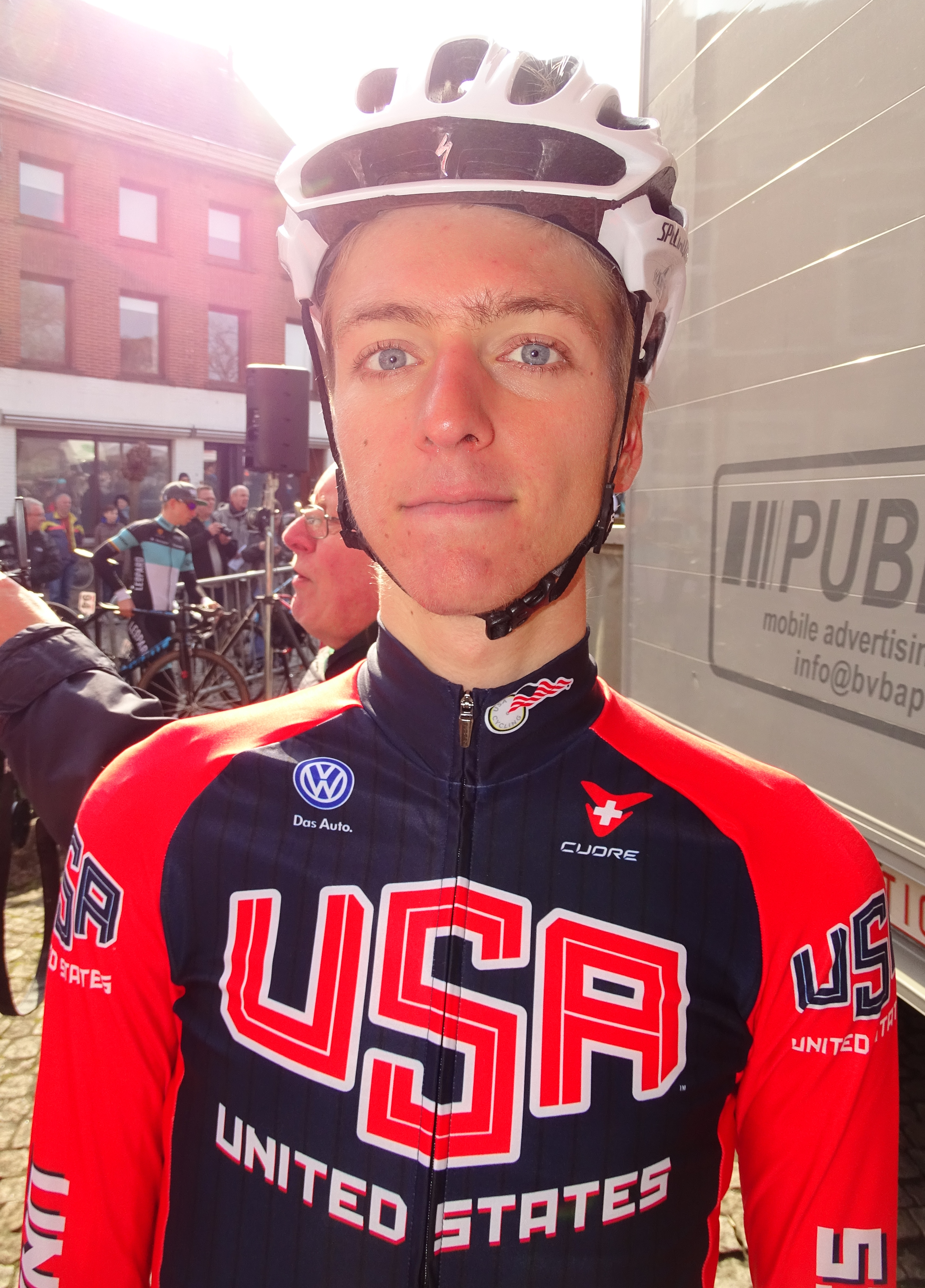 Triptyque des Monts et Châteaux 2016 Depicted person: Depicted team: Équipe nationale des États-Unis espoirs